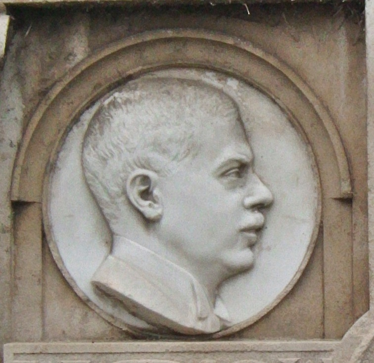 Ludwig Bassermann-Jordan (1869-1914), Weingutsbesitzer und Bürgermeister in Deidesheim, Porträtmedaillon vom Grabstein, Friedhof Deidesheim